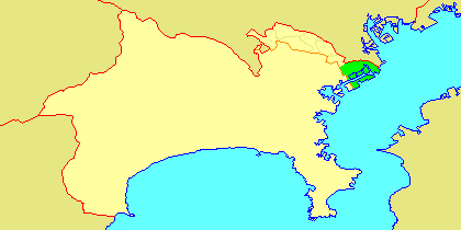 Map of Kawasaki-ku, Kawasaki, Kanagawa-prefecture, Japan